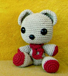 Osito técnica amigurumi